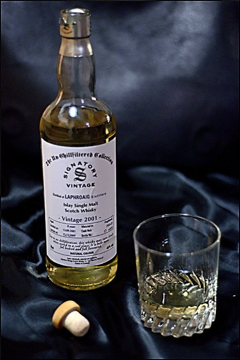 Laphroaig UN-Chillfiltered Vintage 2001